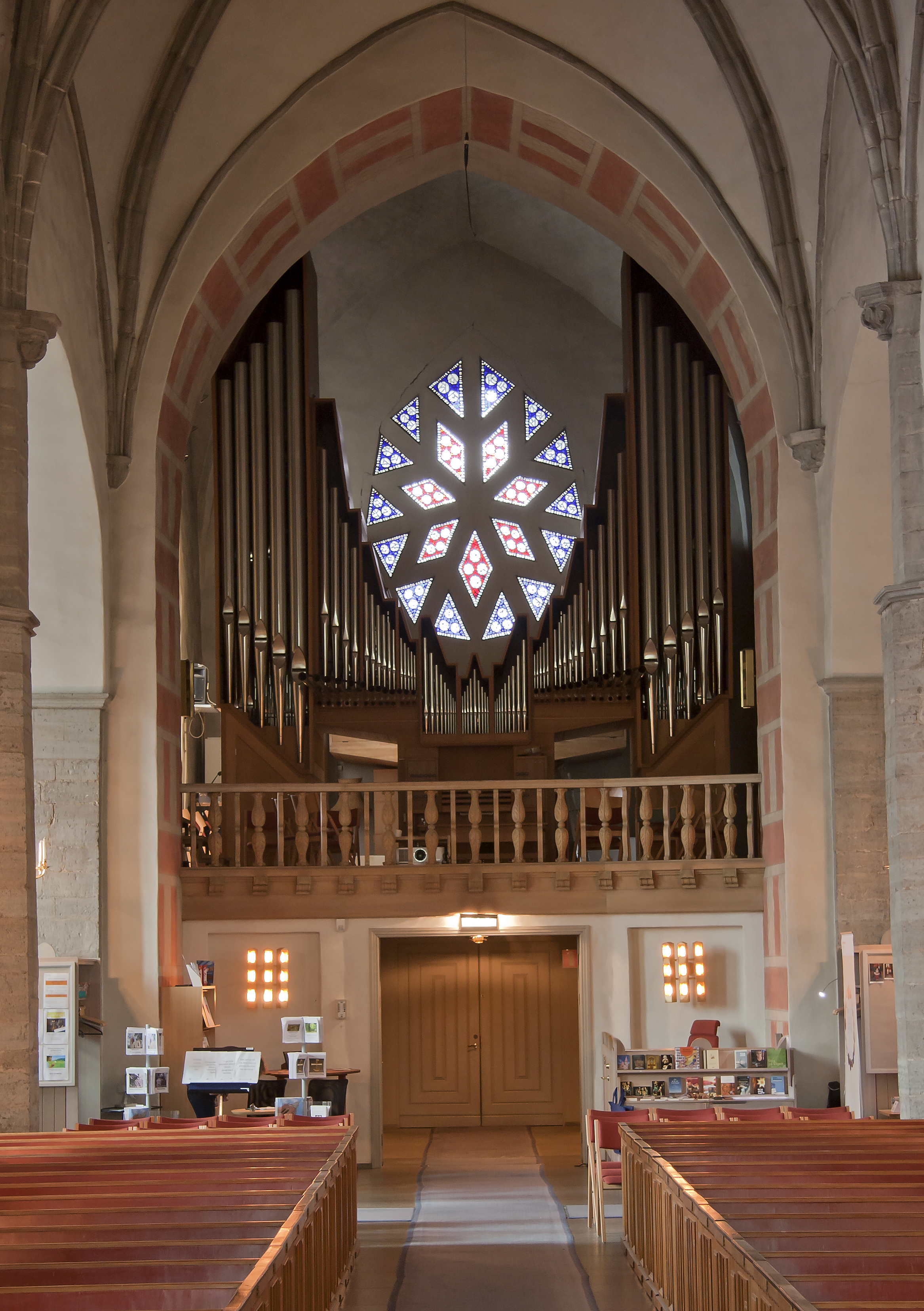 Orgelläktaren i Sankt Nikolai kyrka i Örebro.